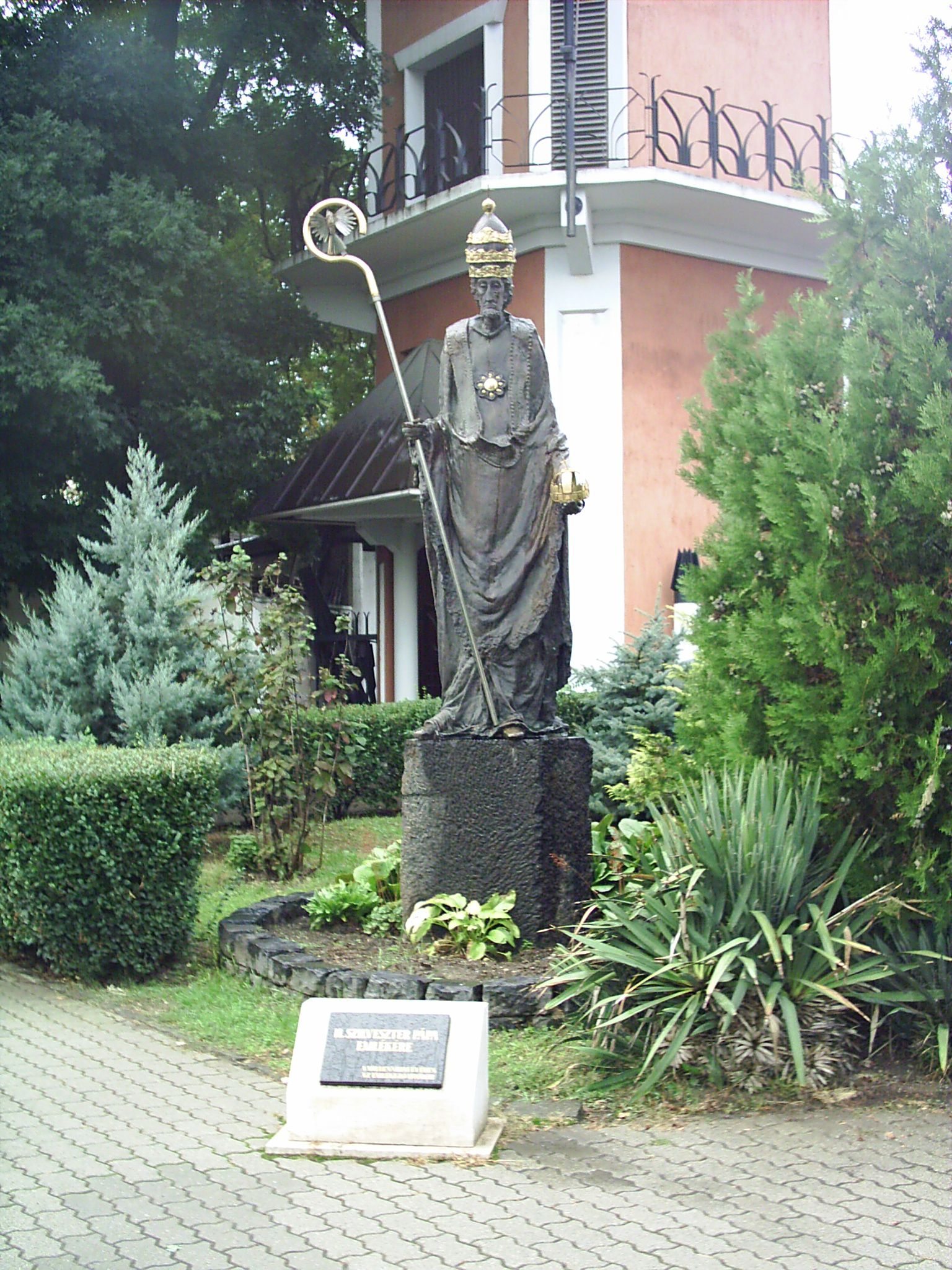 II. Szilveszter pápa szobra a Szt Gellért templom előtt. Varga Imre szobrászművész alkotása (2001)